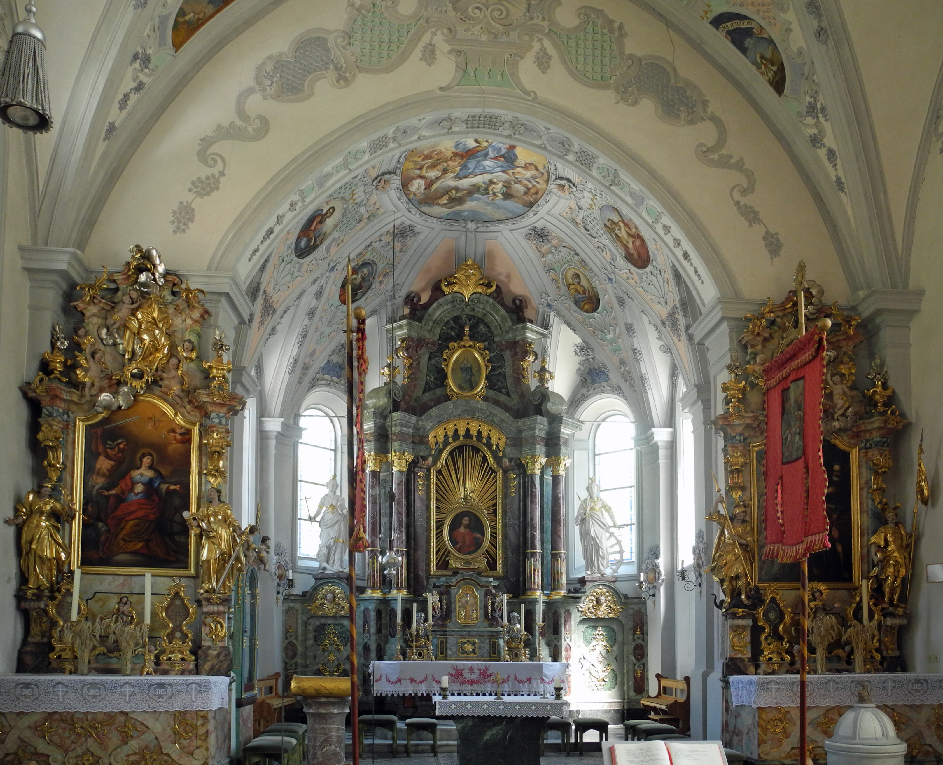 Innnenraum der kath. Pfarrkirche Mariä Geburt in Mieders im Stubaital, Kirchgasse 3